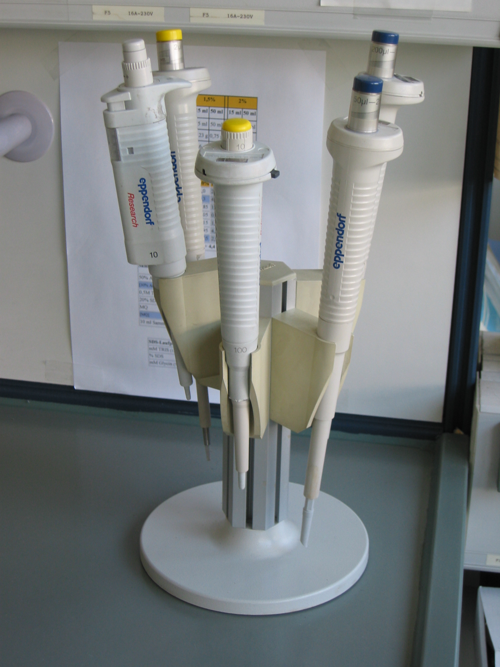 Pipets.